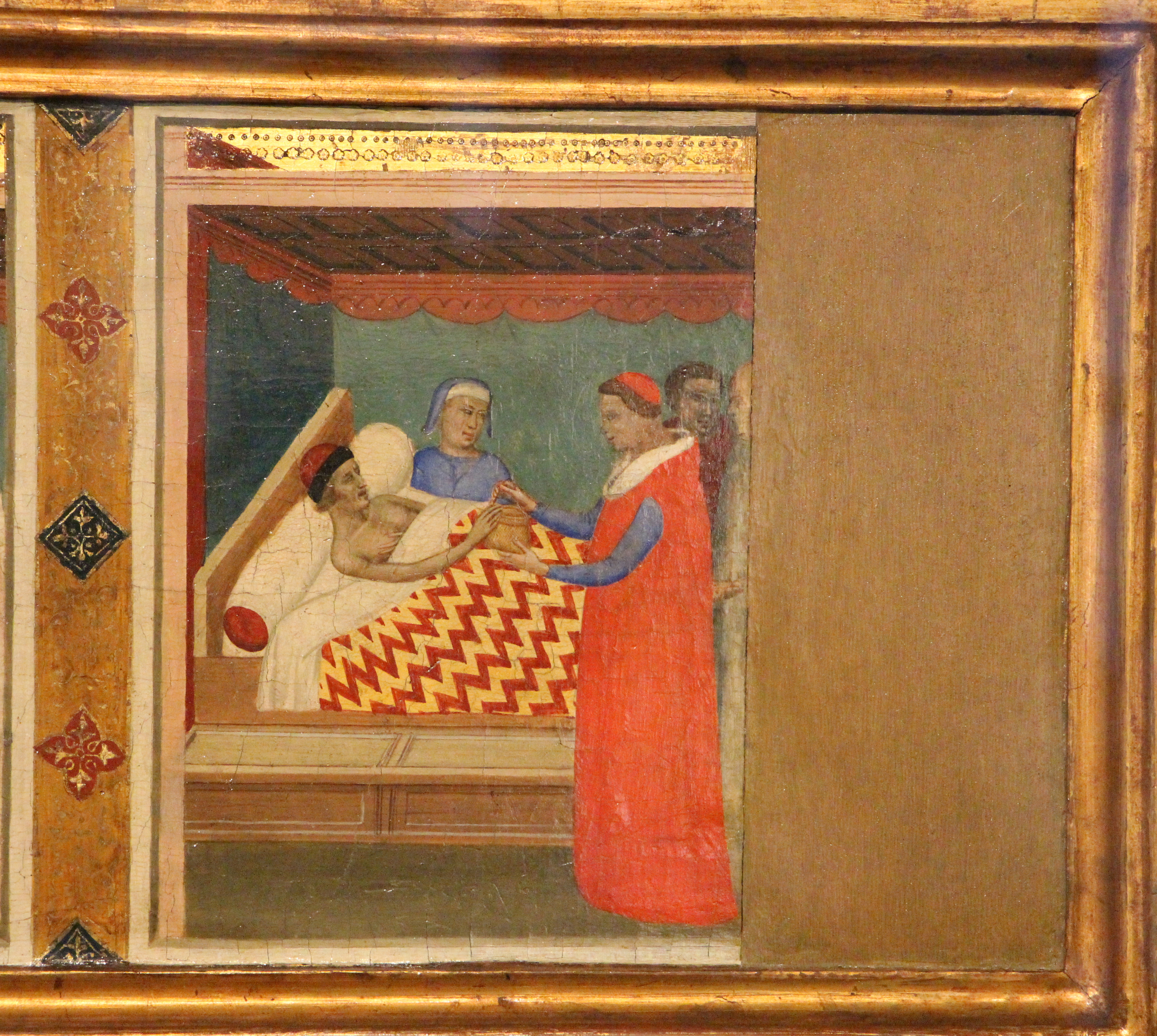 Bernardo Daddi, storie della vera Cintola, 1337-38, da altare maggiore duomo di Prato